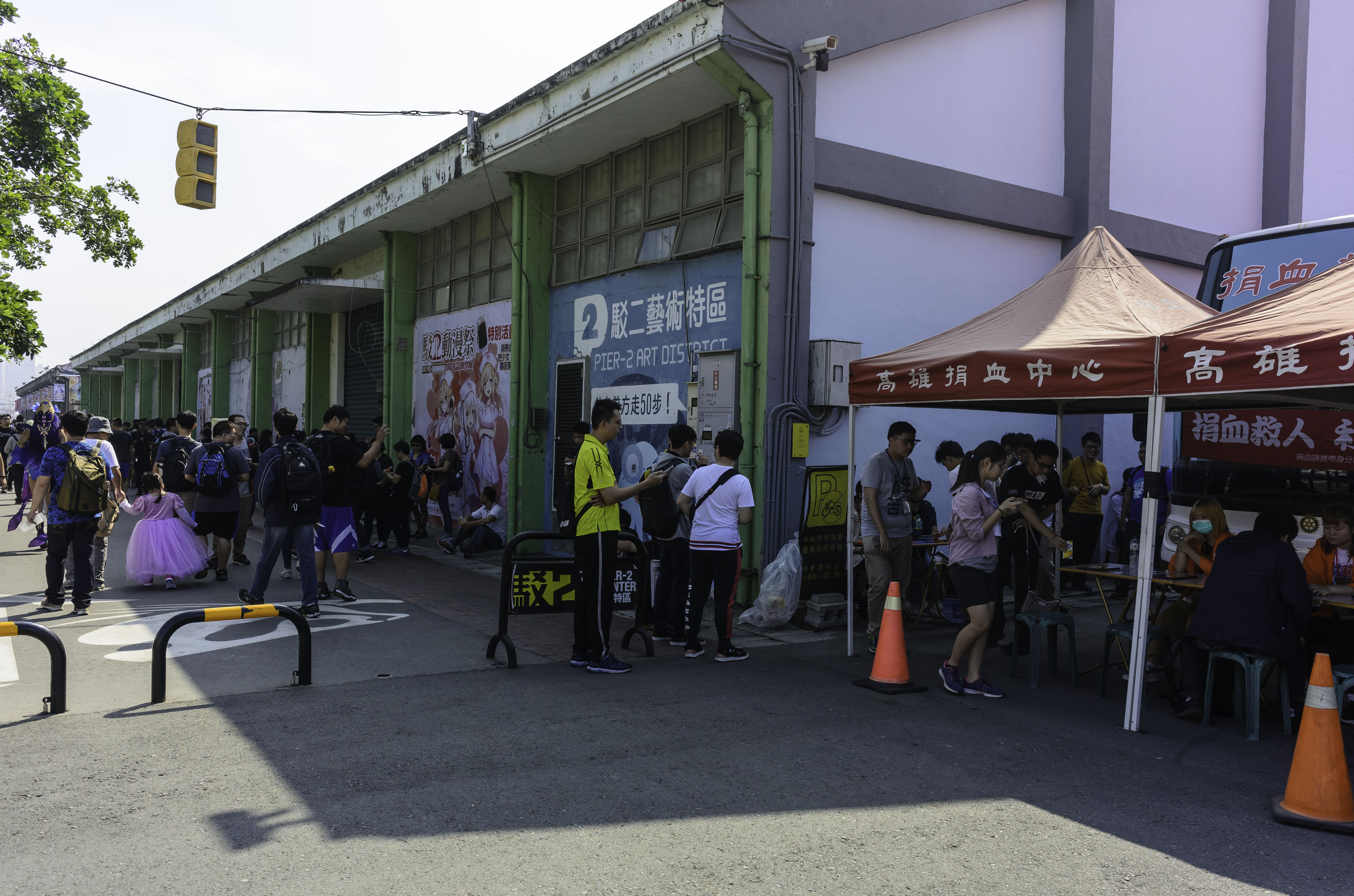 中文（台灣）: 2019駁二動漫祭第二日上午，台灣血液基金會高雄捐血中心與食用系少女合作玩家捐血活動。